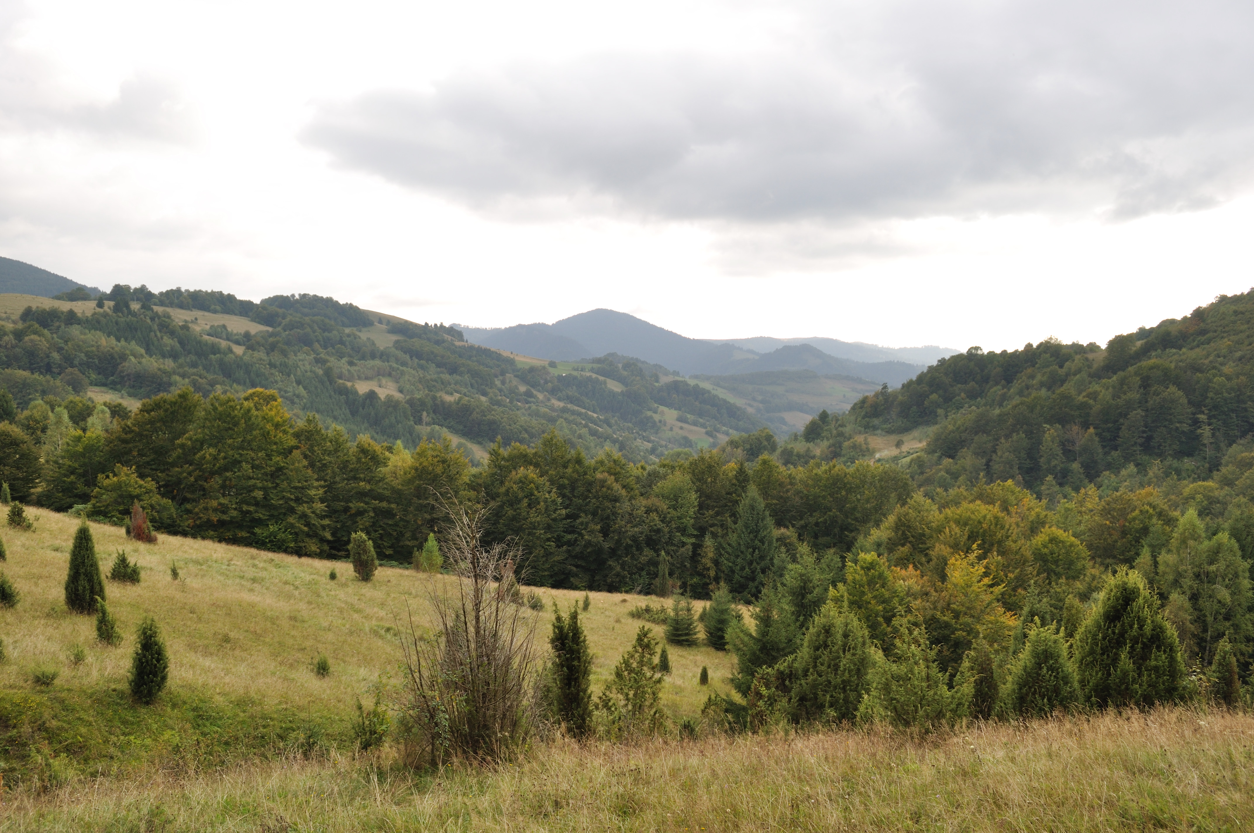 Bucium-Poieni, județul Alba